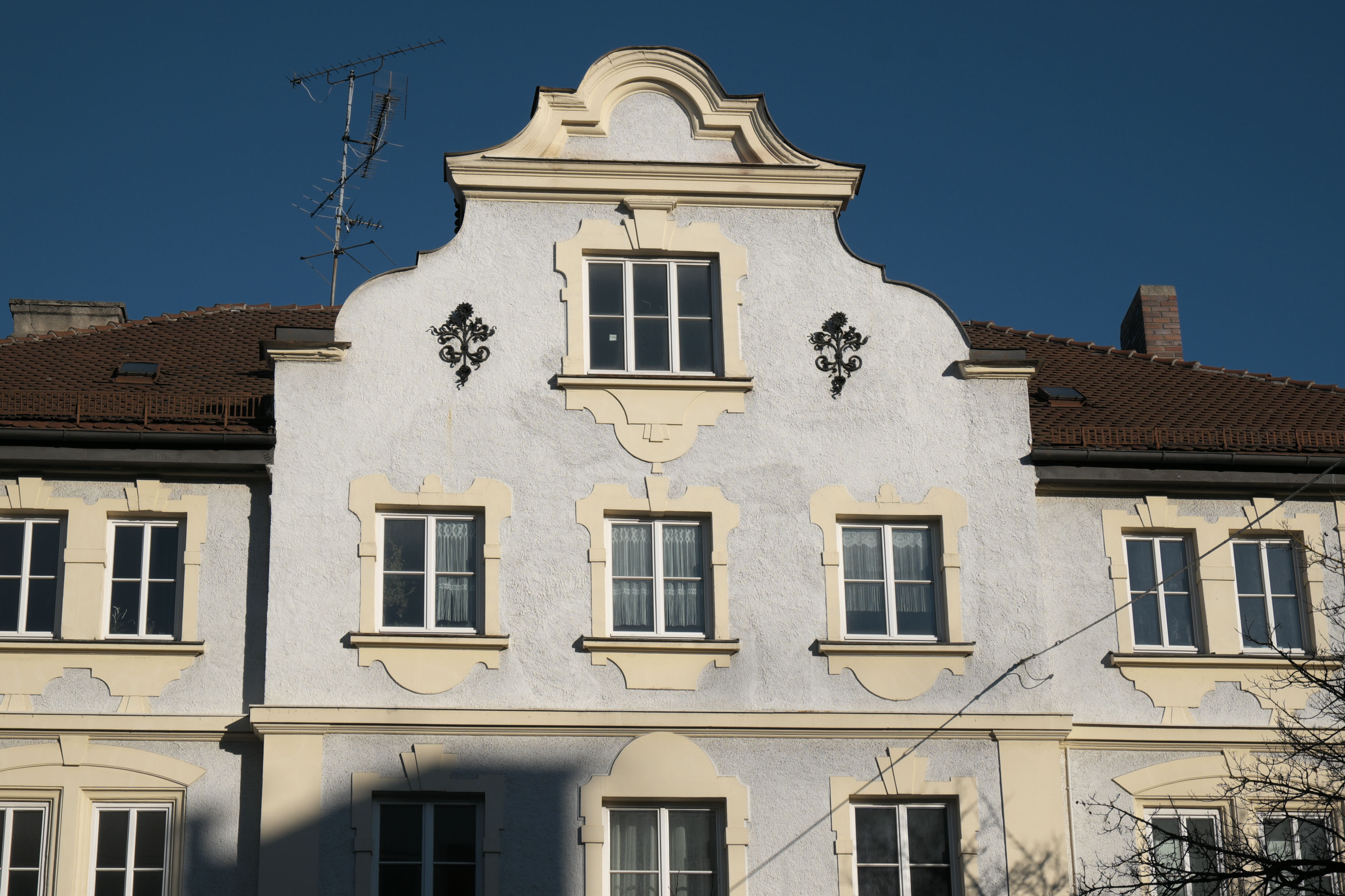 Wohnhaus in der Landsberger Straße 430 in Pasing im Stadtbezirk Pasing-Obermenzing in München (Bayern/Deutschland)